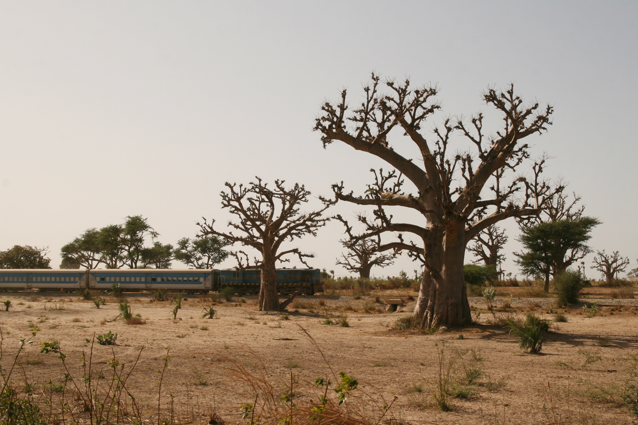 Train circulant dans les baobabs au Sénégal